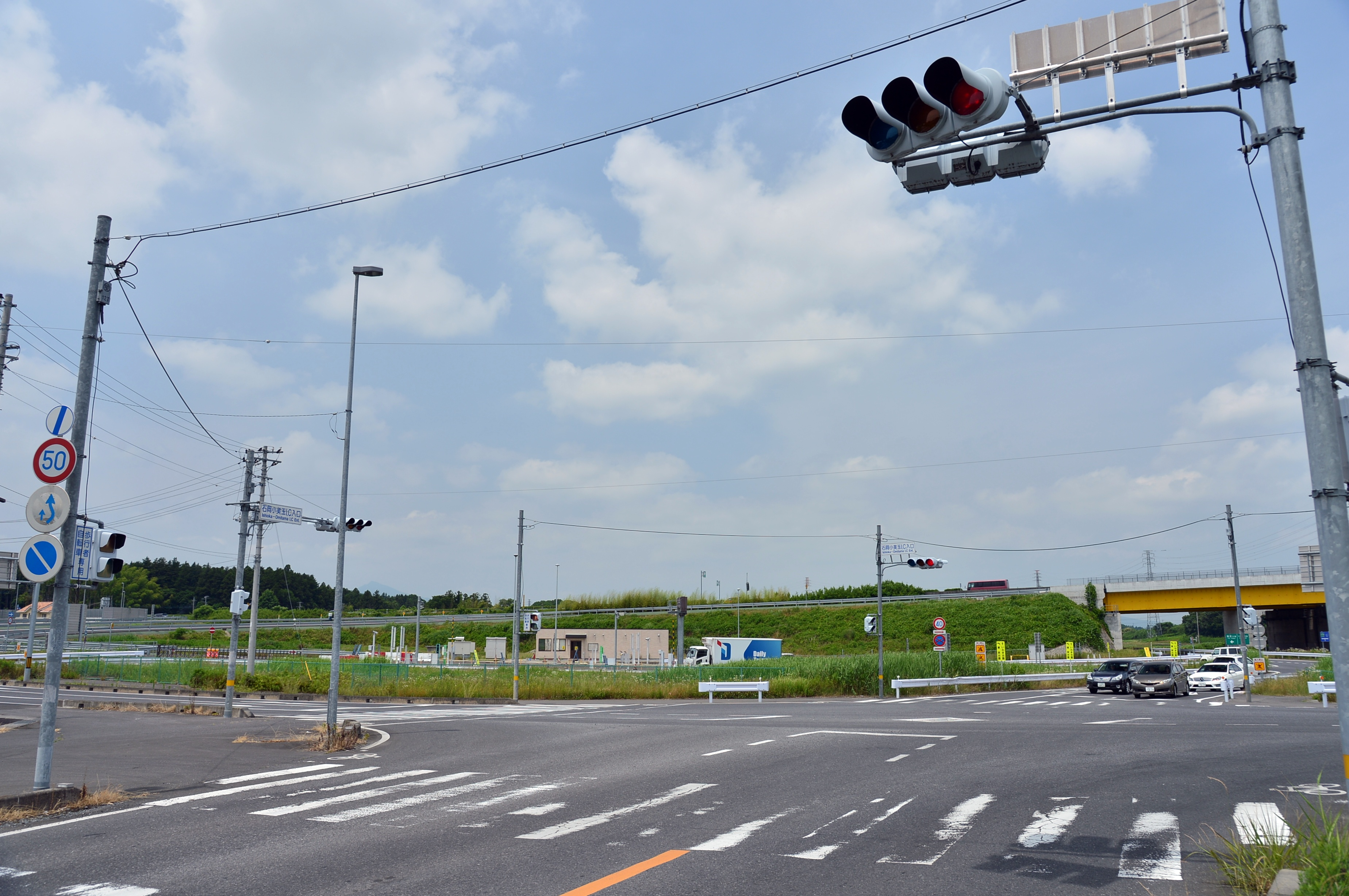 石岡小美玉I.C入口交差点（石岡市正上内）より、石岡小美玉インターチェンジ（上り線側）を望む。